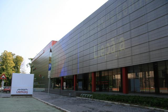 cx c c